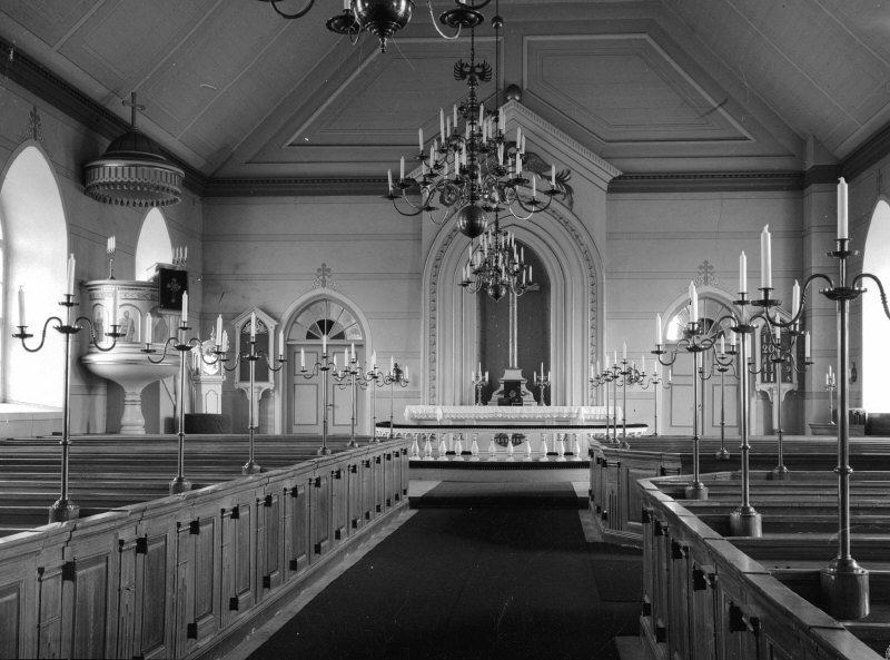 Interiör mot öster. Kategori: (02) InteriörerInteriör mot öster.